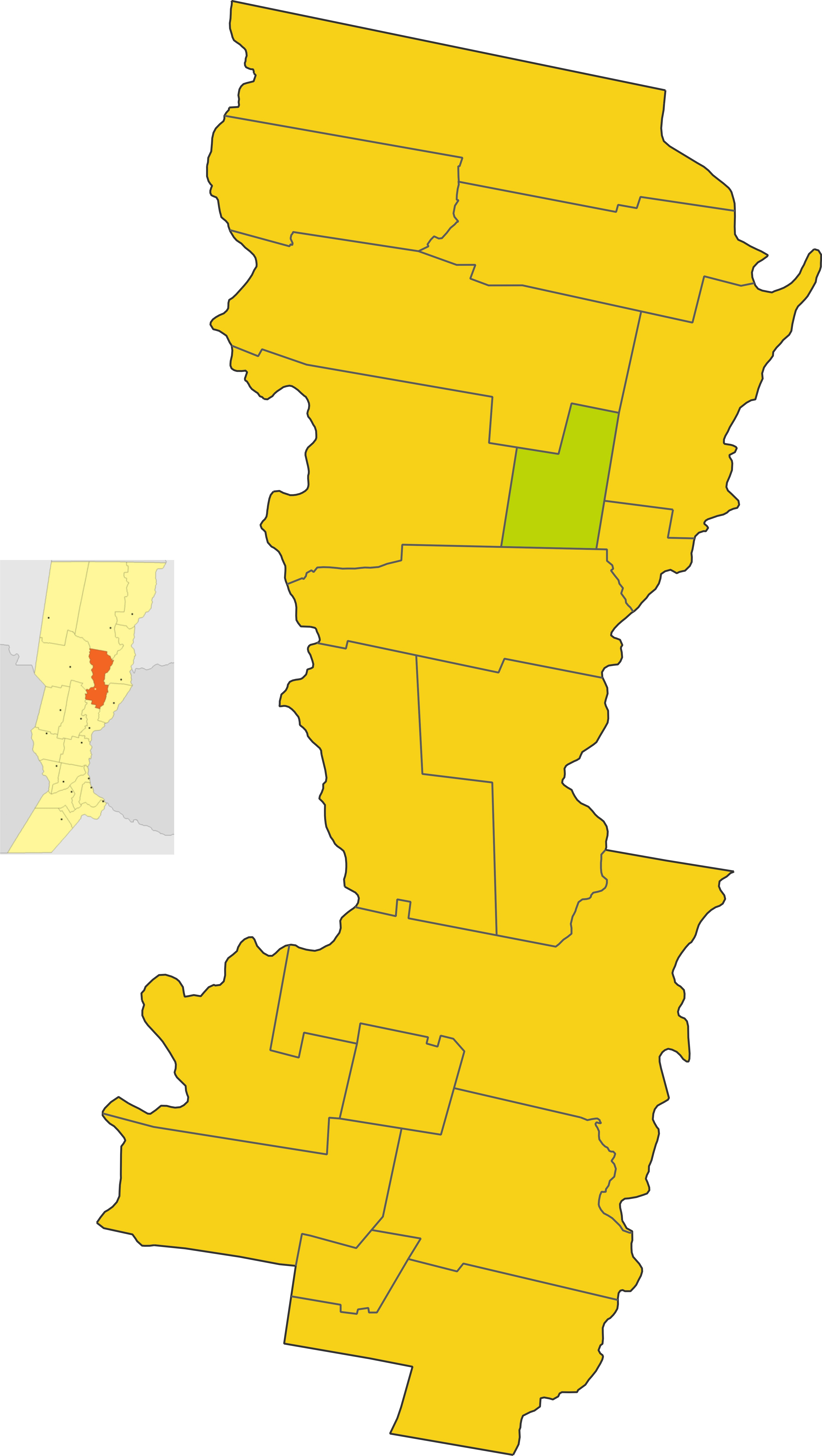 Map of the comuna de Gobernador Crespo in San Justo department,Santa Fe province, Argentina